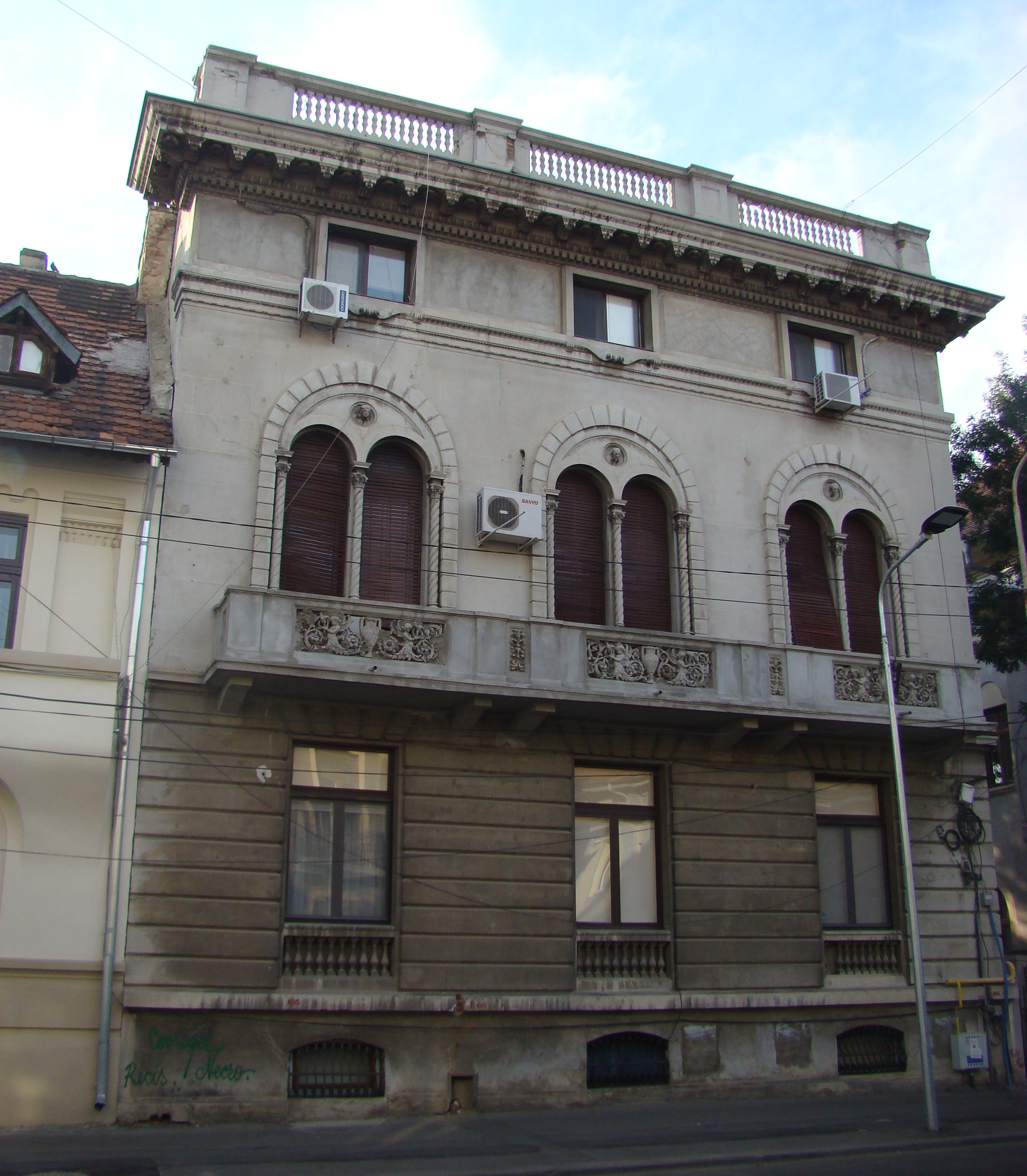 Clădire monument istoric, str. Paris, nr.7